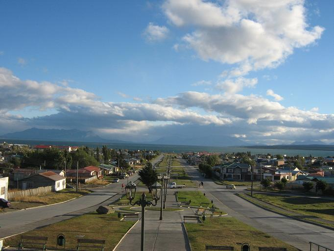 Puerto Natales, Bueras Avenue